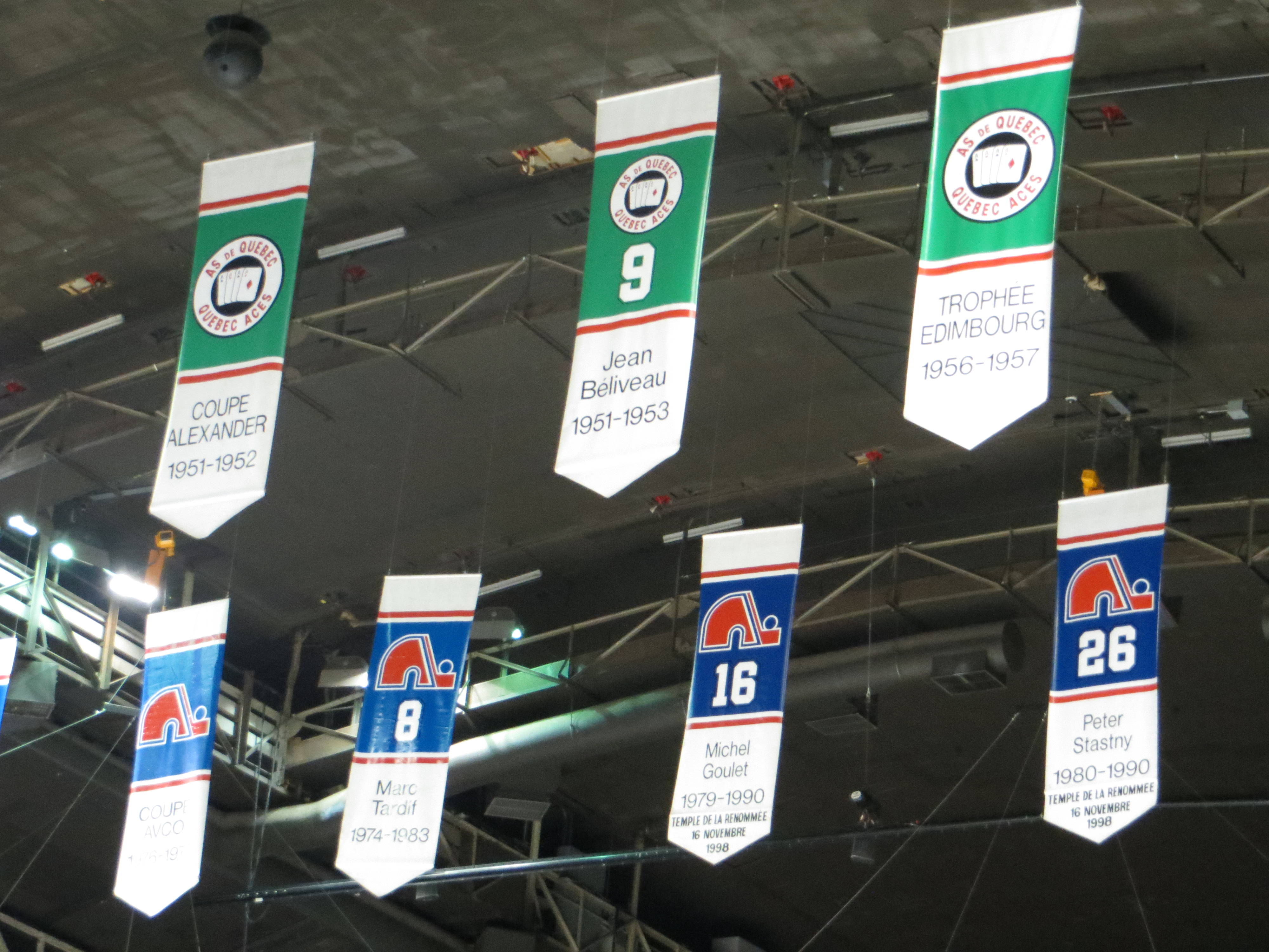 Bannières des As de Québec et des Nordiques au Colisée Pepsi.